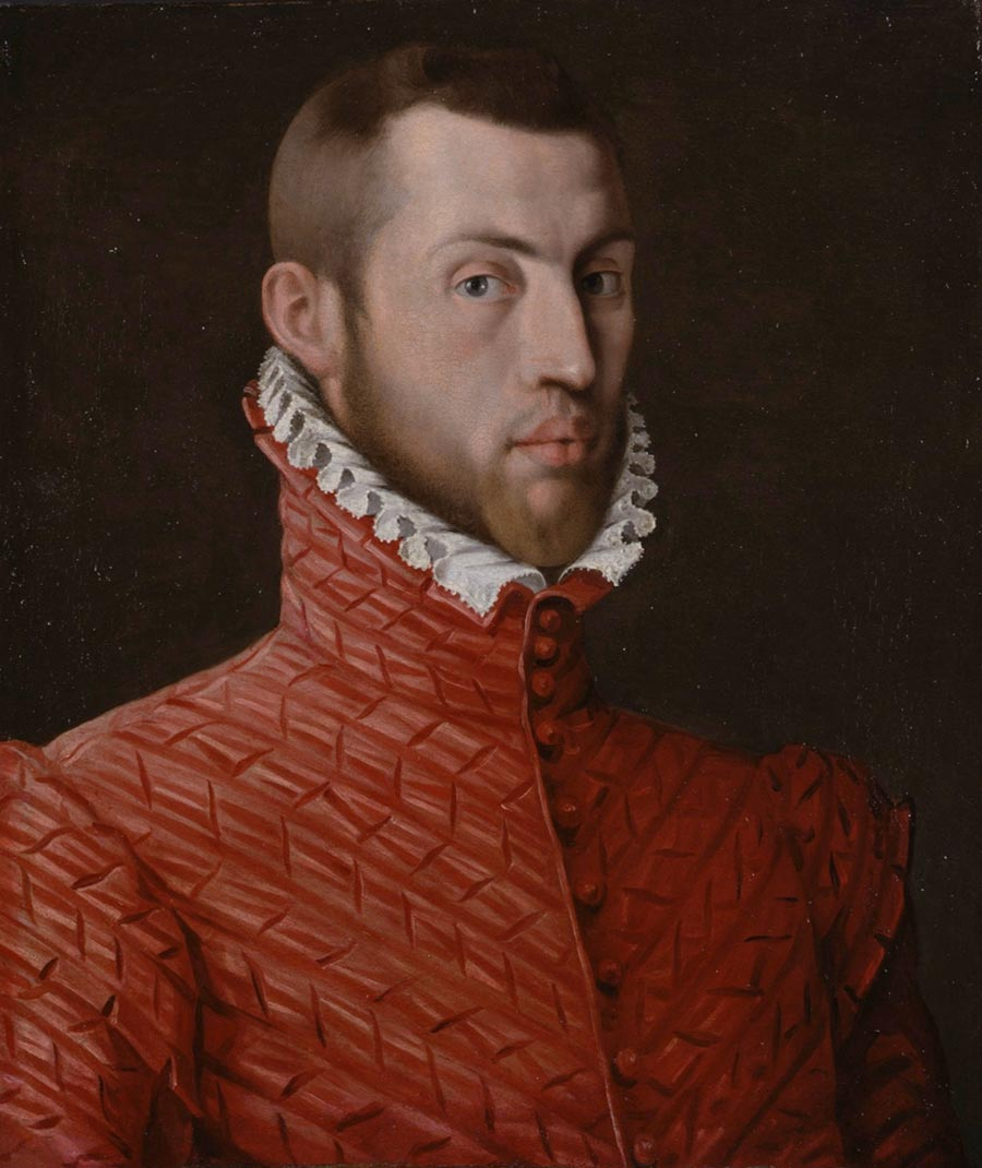 Olio su tela di 60 x 51 cm. Attribuito a Bernardino Campi – 1582 (?). Rinvenuto sul mercato antiquario nel 1992 (proposto in vendita da Sotheby’s come “Ritratto di gentiluomo”). Si trova attualmente a Pienza, in una collezione privata di una famiglia di origine mantovana.